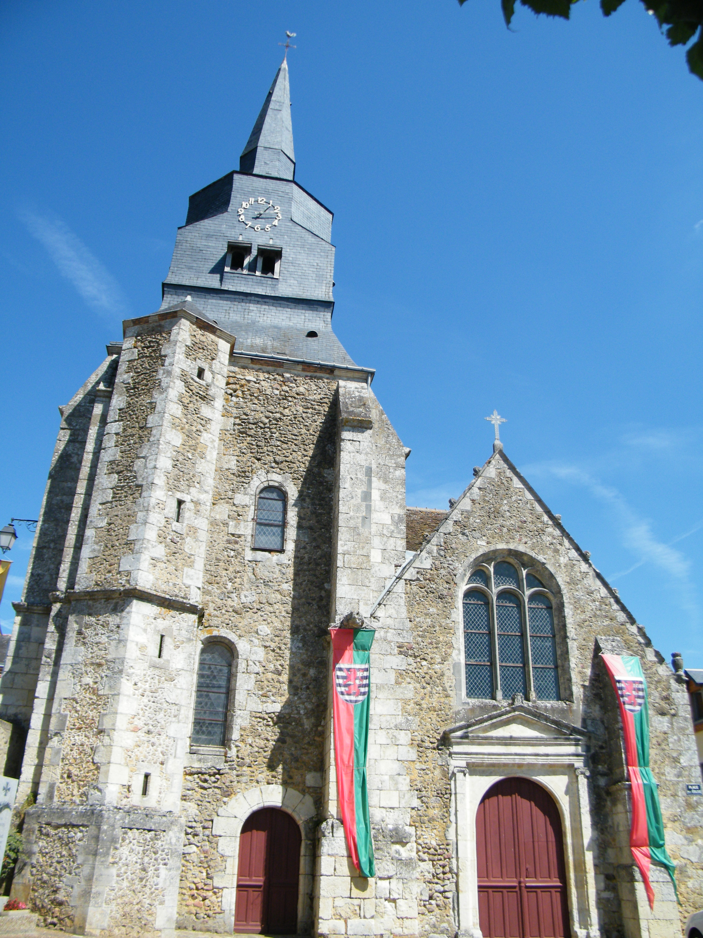 Montmirail, Sarthe,, Fr, église